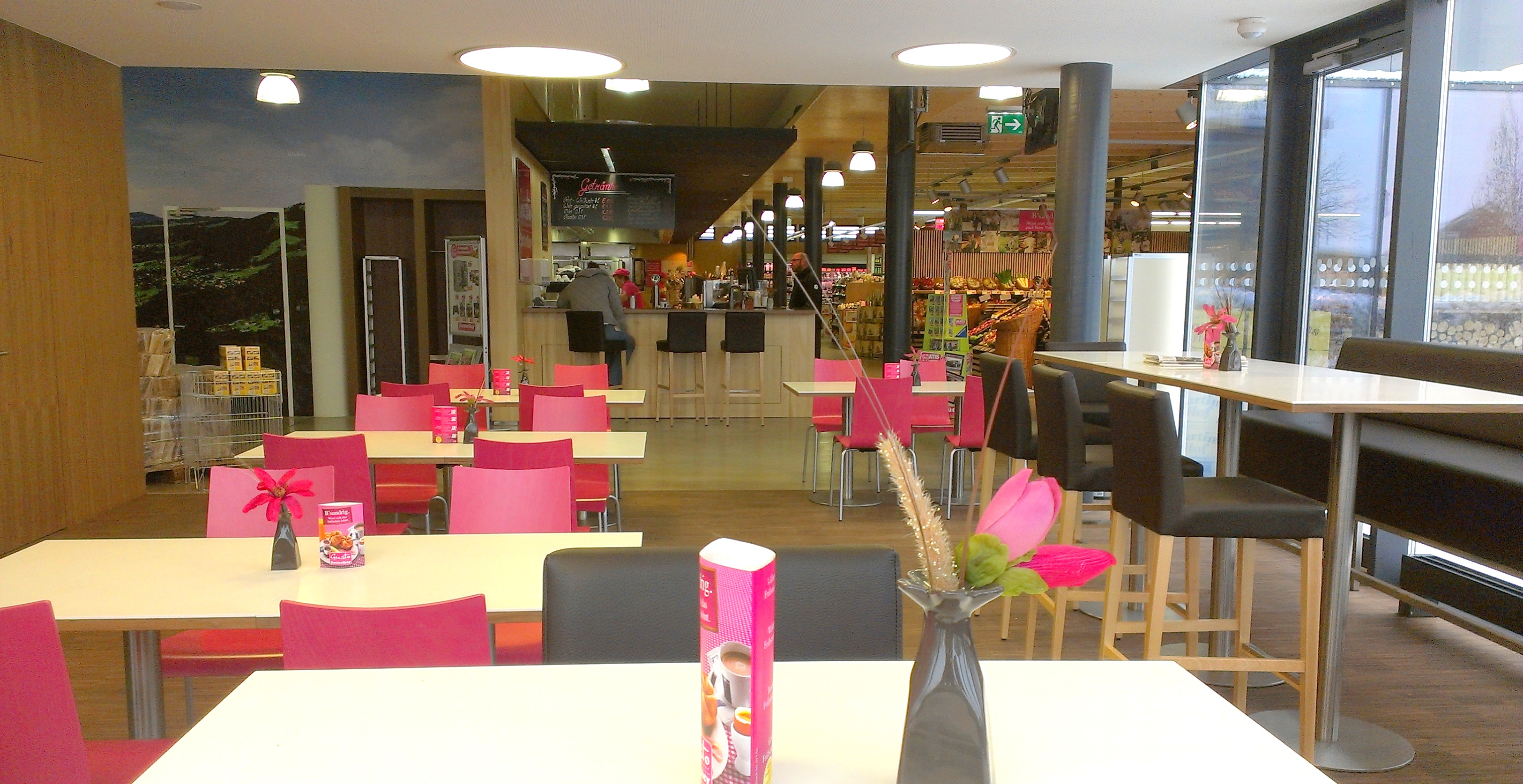 Sutterlüty Dornbirn Kehlerpark